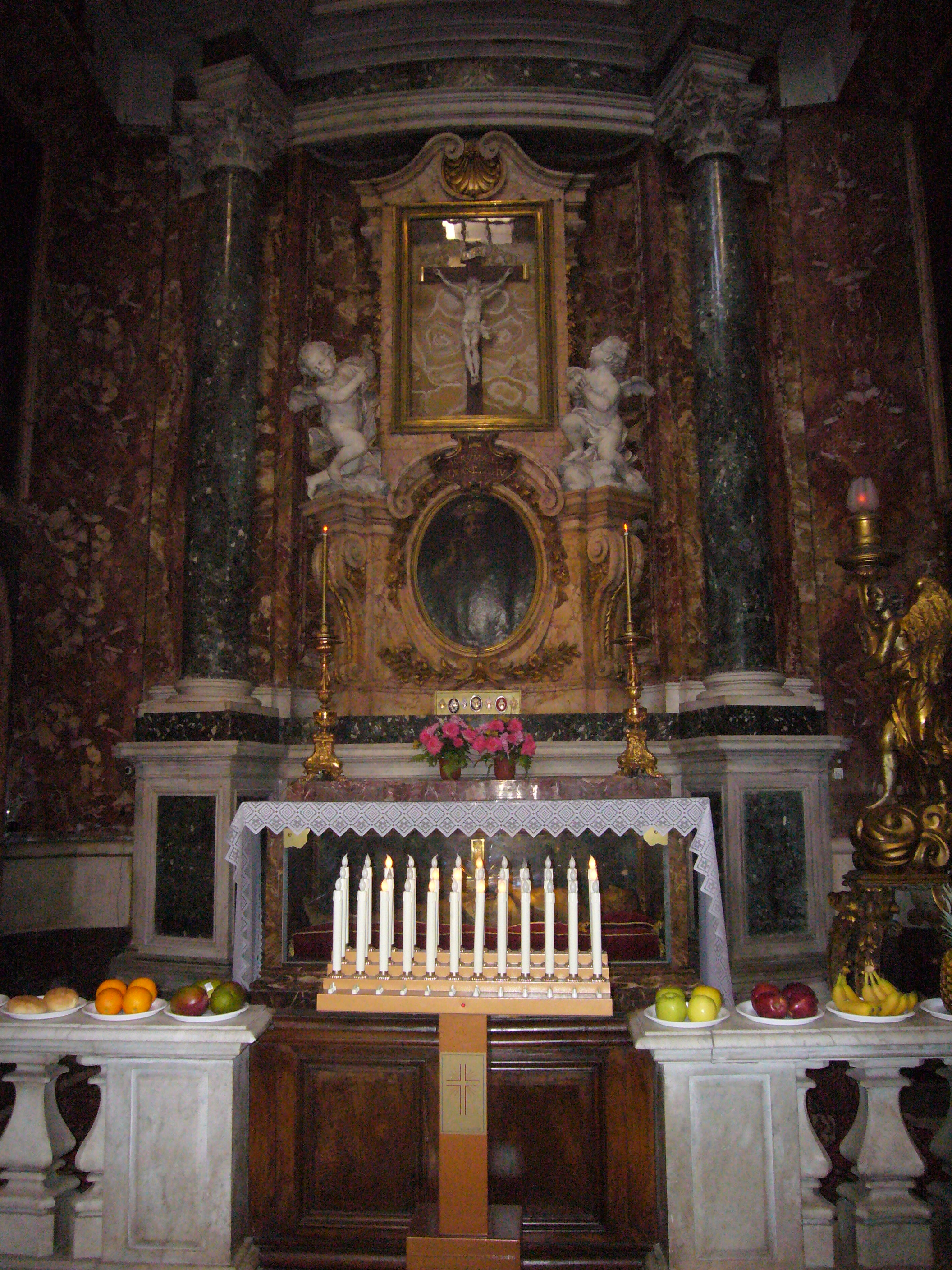 Roma, chiesa delle stimmate di San Francesco, offerte alla cappella del crocifisso Algardi